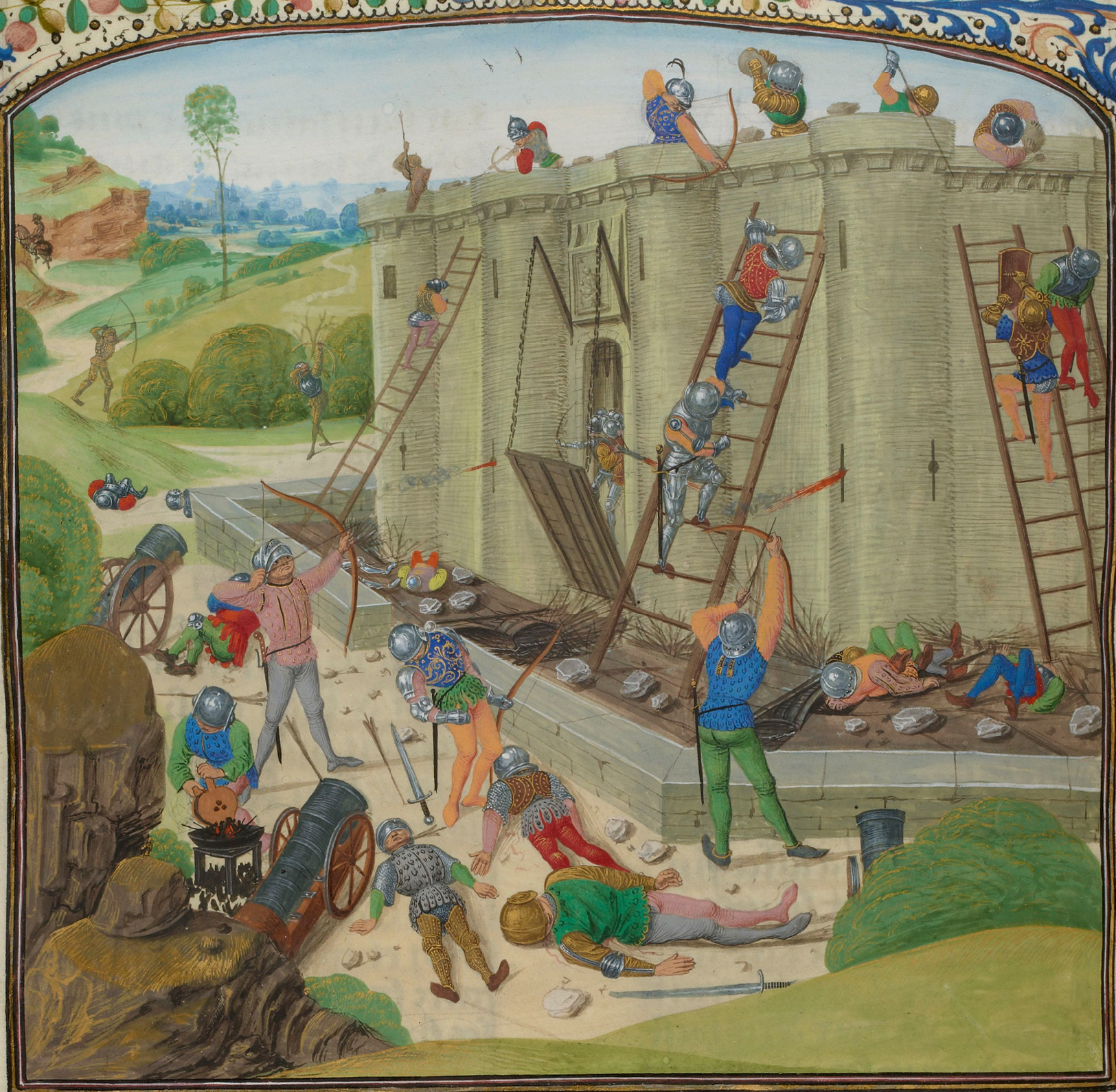 Les plus anciennes représentations connues du château illustrent le siège de Brest par le duc de Lancastre en 1386. Chroniques de Jean Froissart. manuscrit du XVe siècle. La scène n'est pas réaliste, ni dans les phases du combat, ni dans le matériel employé (des bombardes sur roue). La mer ne figure même pas dans le paysage. Cette minialure symbolise néanmoins l'importance stratégique de la place de Brest à la fin du Moyen Age ainsi que l'âpreté des luttes pour son contrôle.